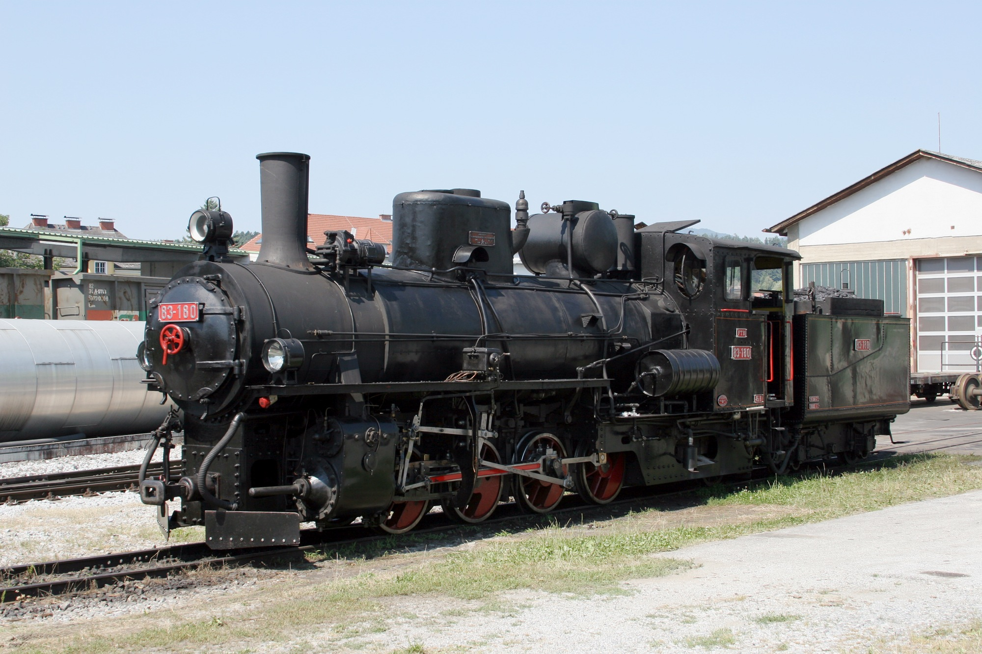 en: Former Yugoslavian States Railway JDŽ 83-180 in Weiz depot on the Feistritztalbahn, Styria. de: Vormals Jugoslawische Staatsbahnen JDŽ 83-180 beim Heizhaus Weiz der Feistritztalbahn, Steiermark